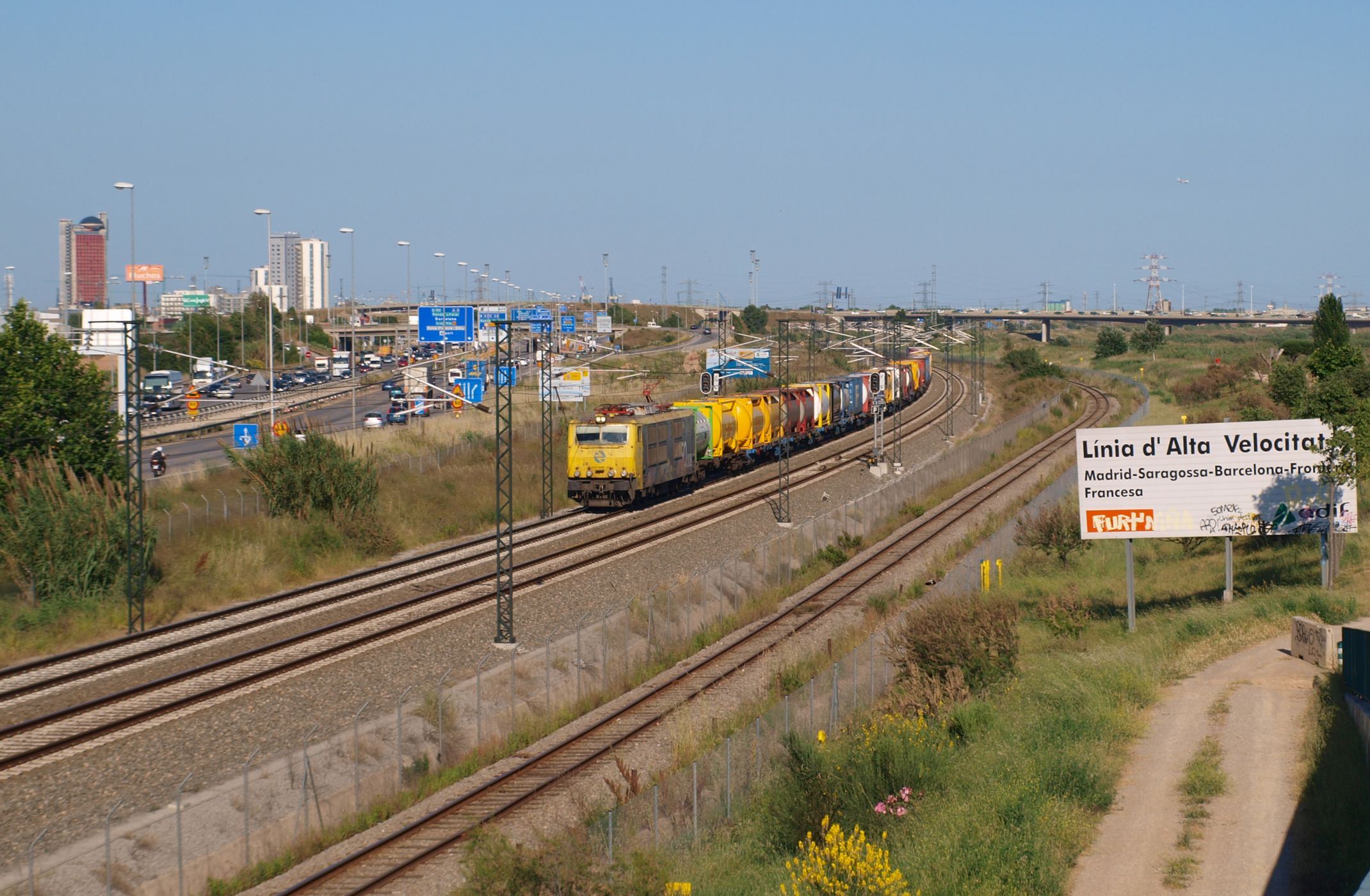 La locomotora 250.008 per el ramal de mercaderies de Can Tunis.